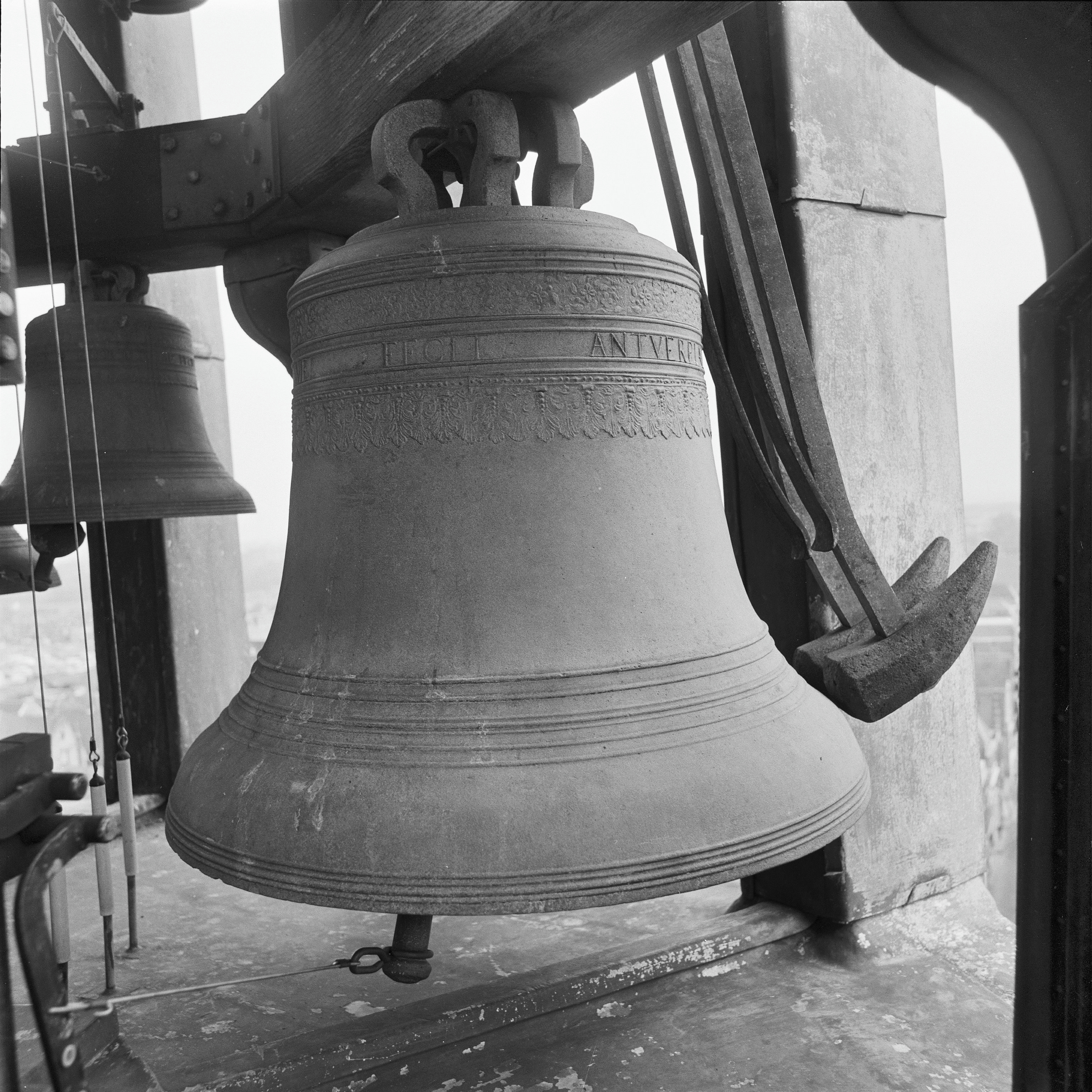 WAAG: INTERIEUR, TOREN, KLOKKENSPEL, KLOK